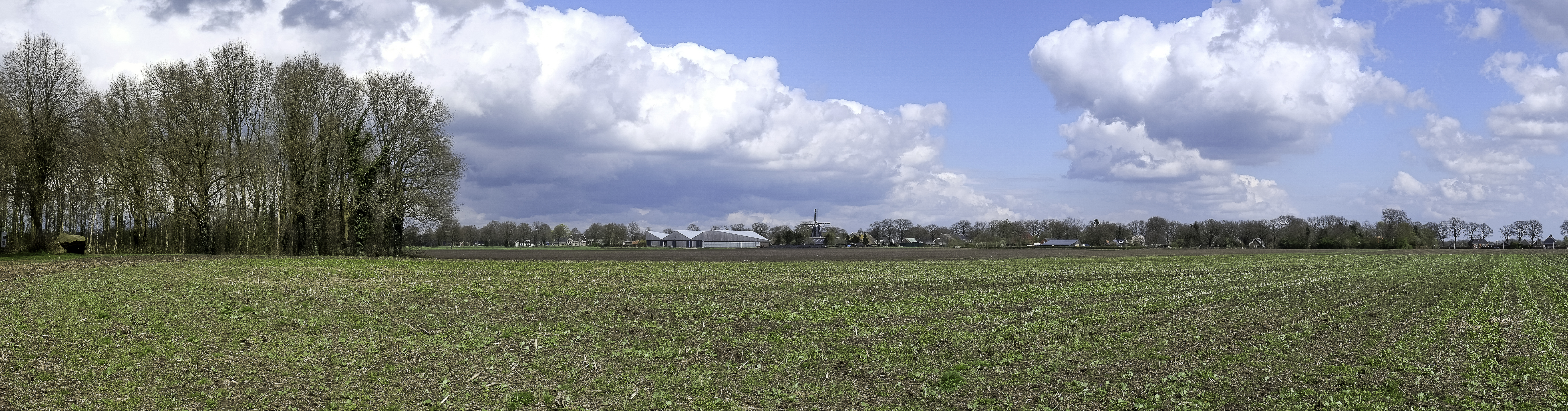 Noordlaren vanaf de Noordlaarder es